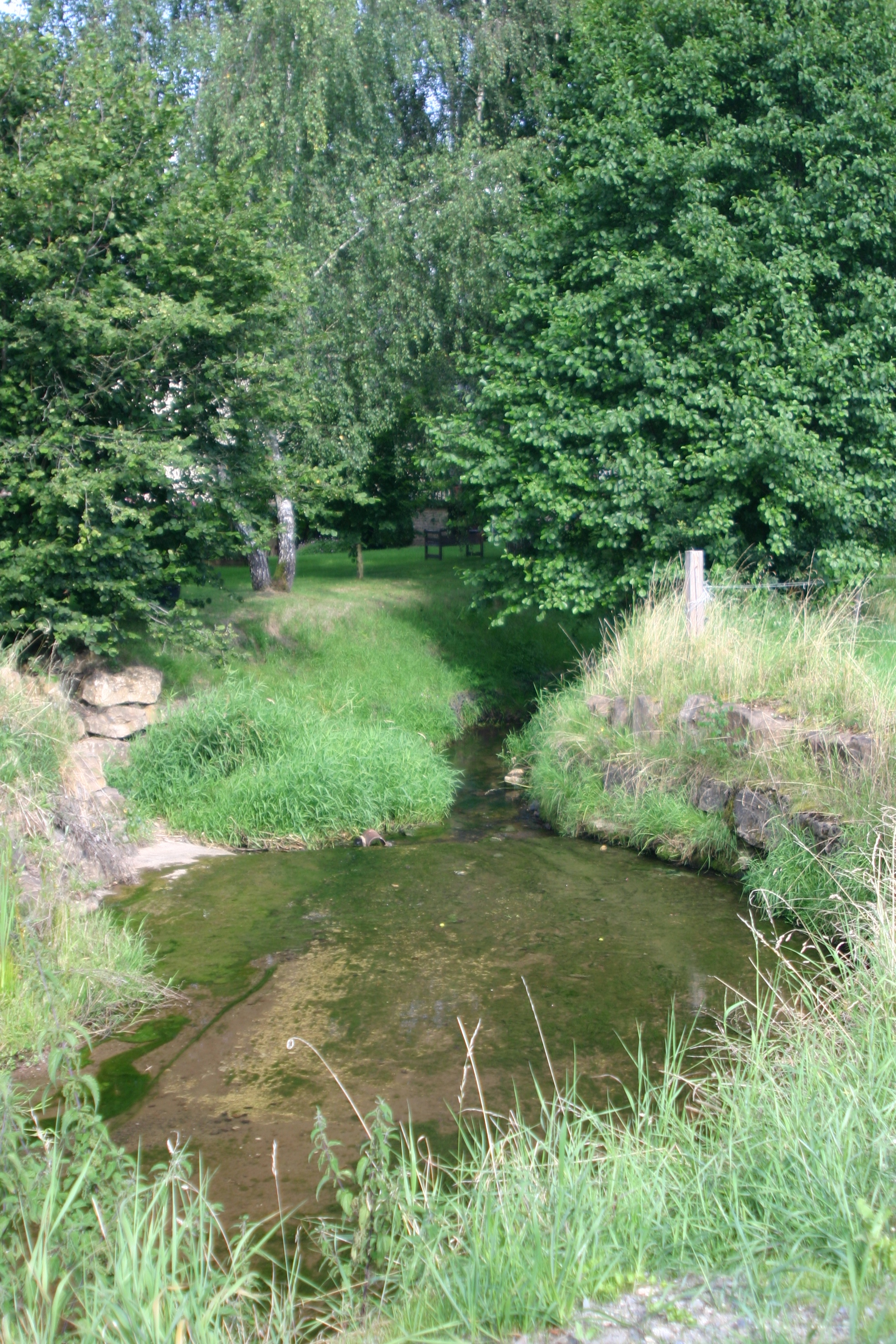 D'Dreibach direkt no dem Zesummefloss vum Ruisseau de Schockeville, Foulterflass, a Ruisseau de Post, zu Post (Belsch).